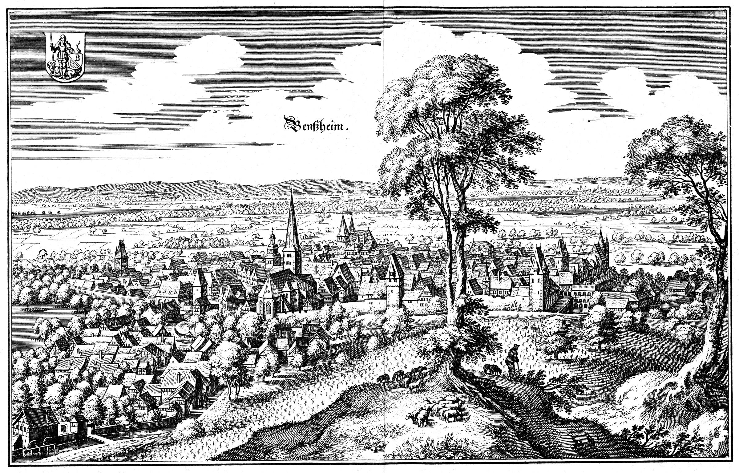 Ansicht von Bensheim, 1646, Kupferstich auf Papier